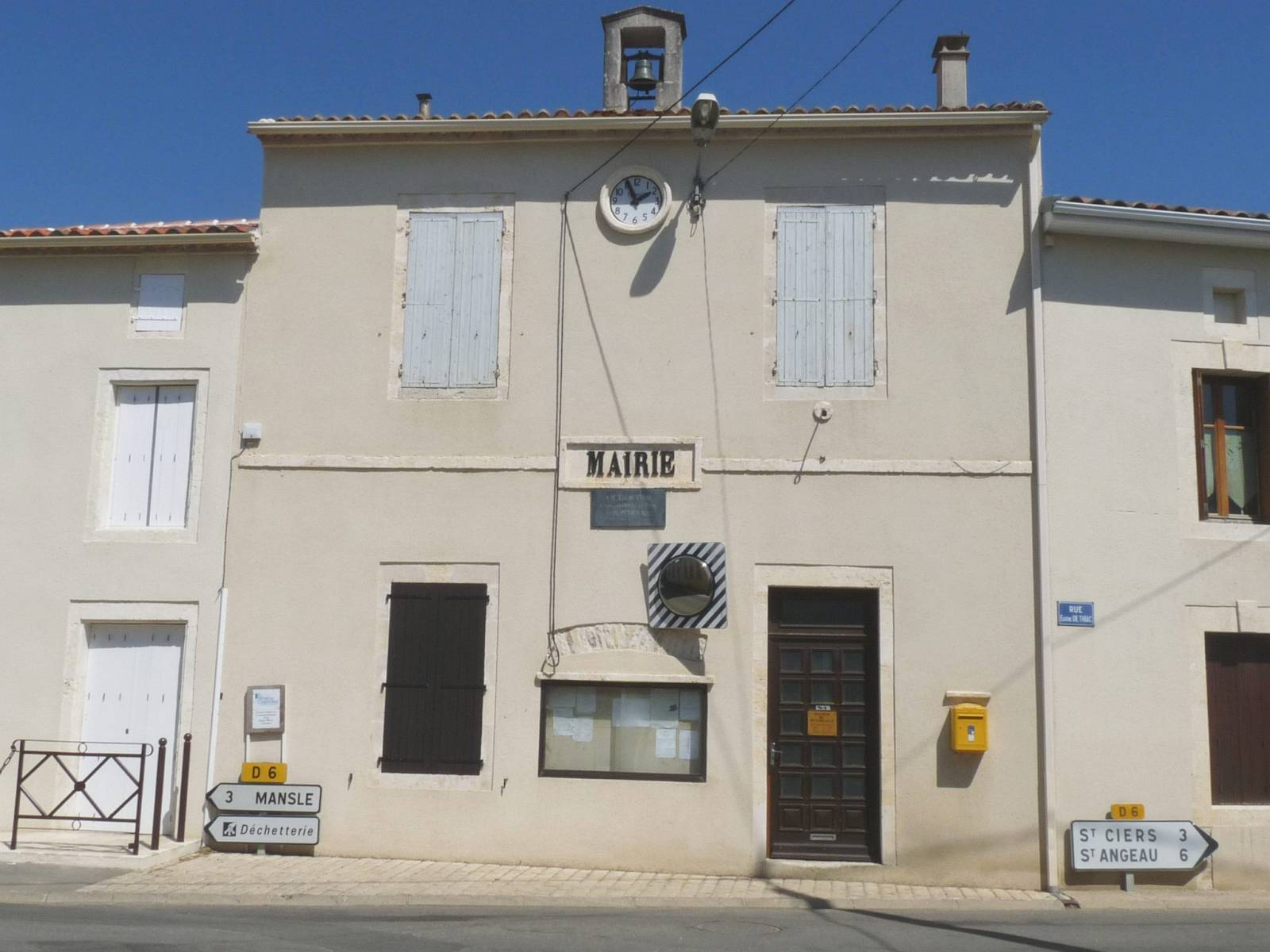 Mairie de Puyréaux, Charente, France